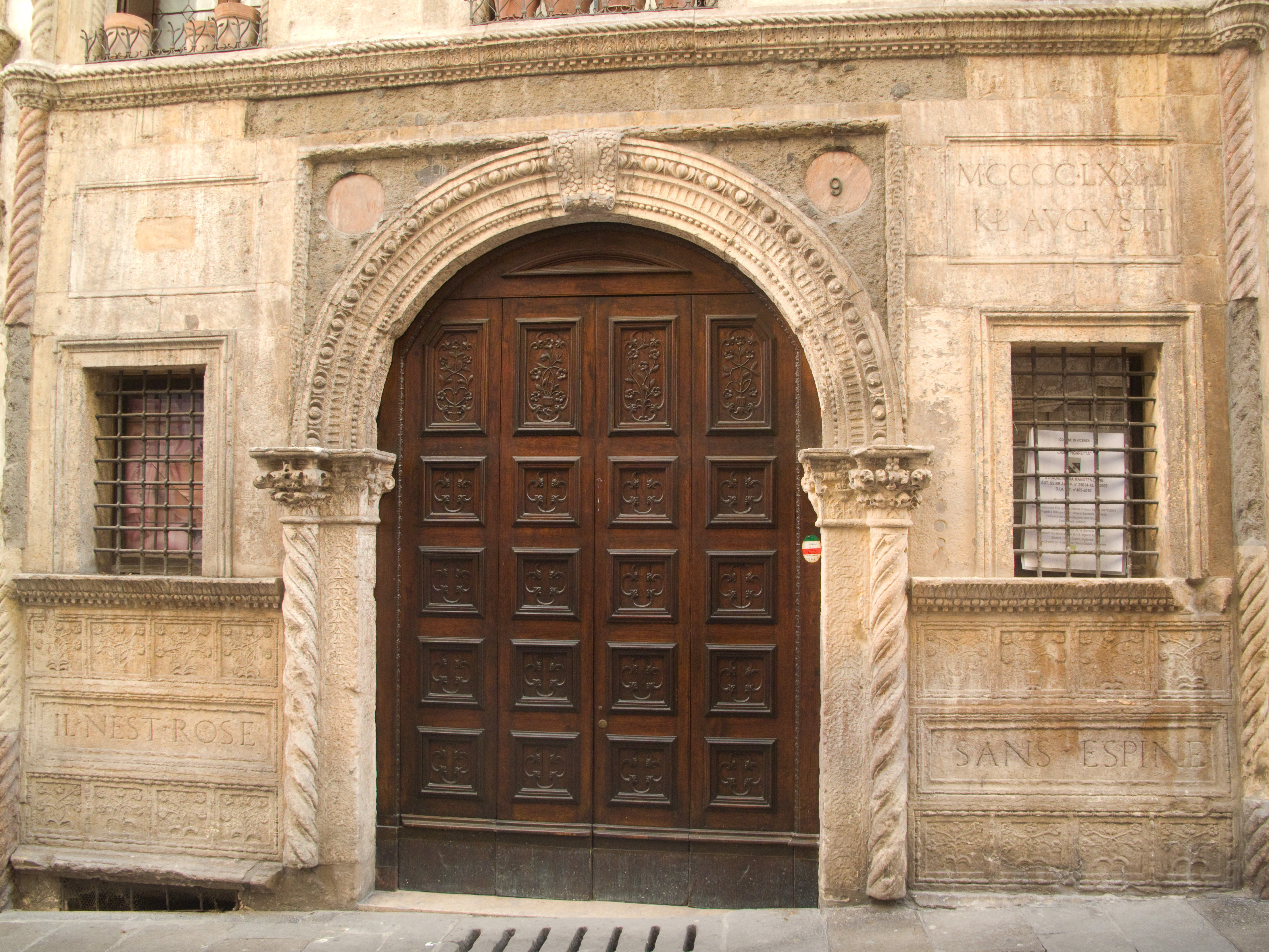 Vicenza - Palazzo Pigafetta, portone